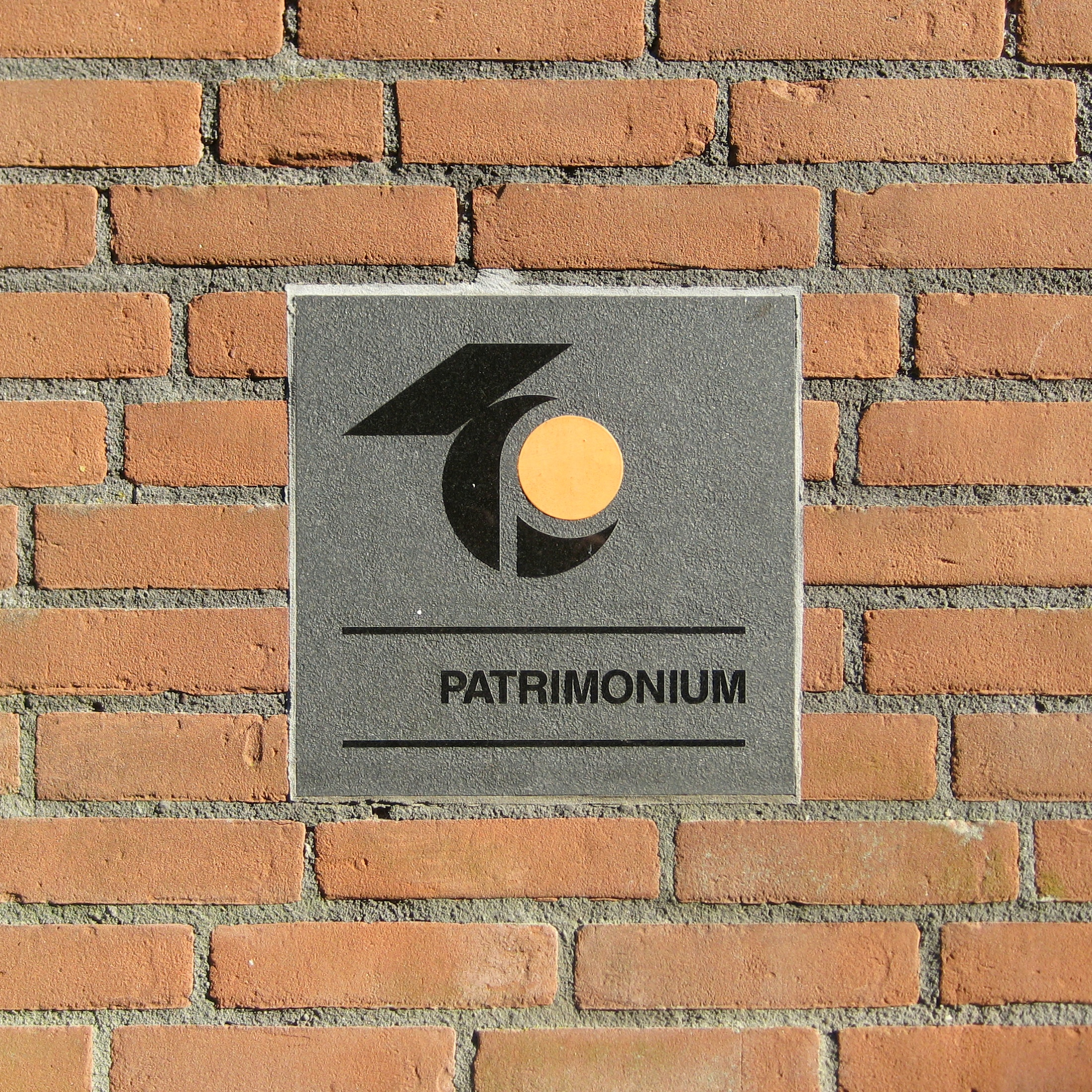 Gevelstien fan de Christelijke Woningstichting Patrimonium yn in huzenblok oan de Driehovenstraat yn de Grinzer Rivierenbuurt.